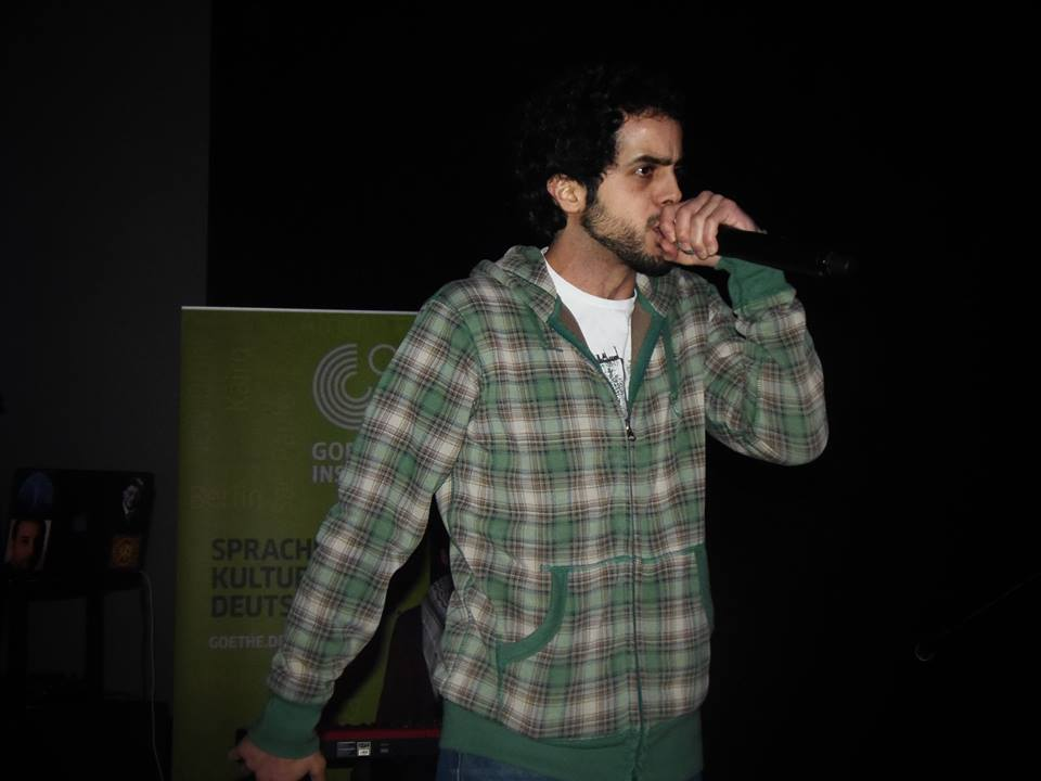 مقاطعة في حفل حي